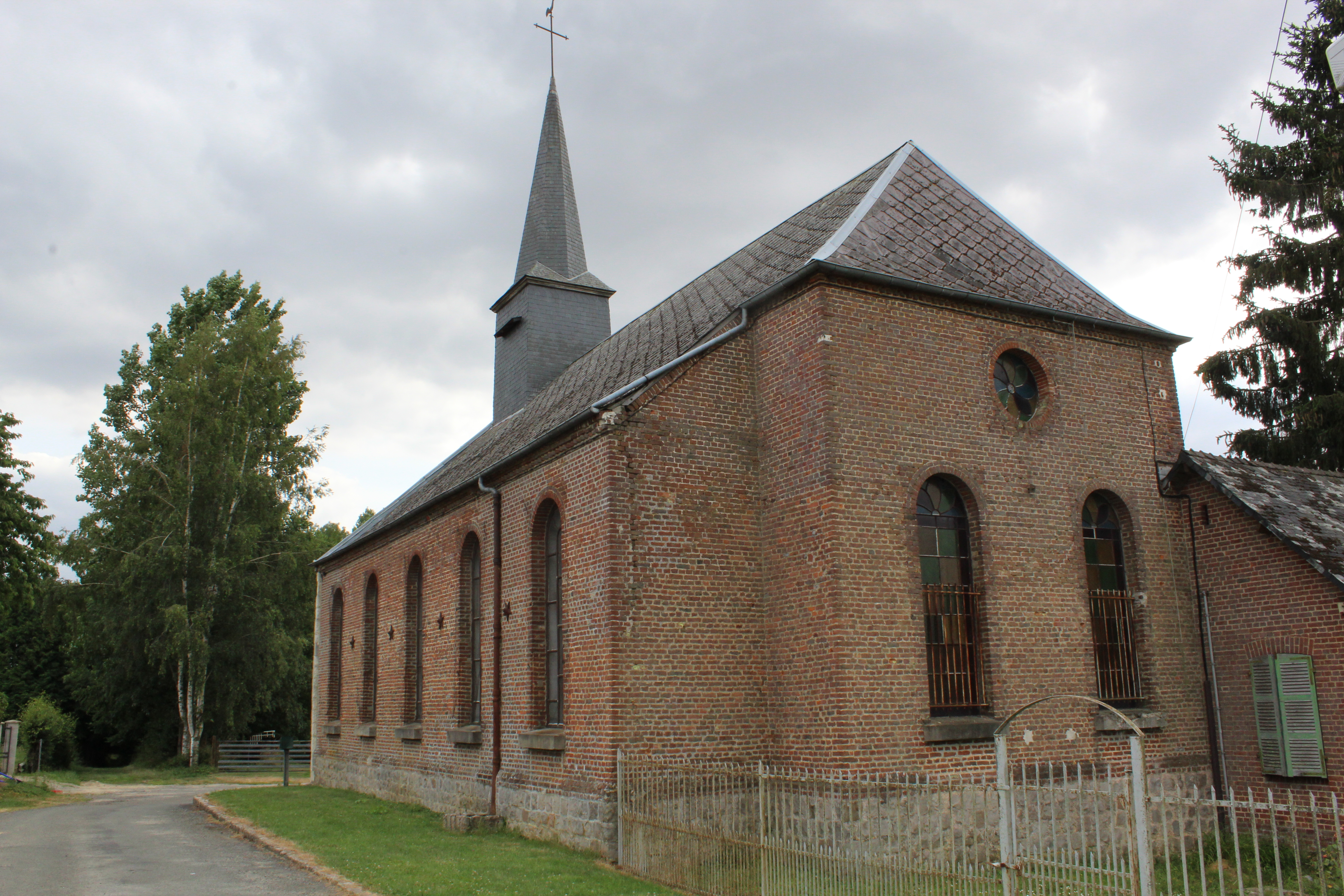 Le temple